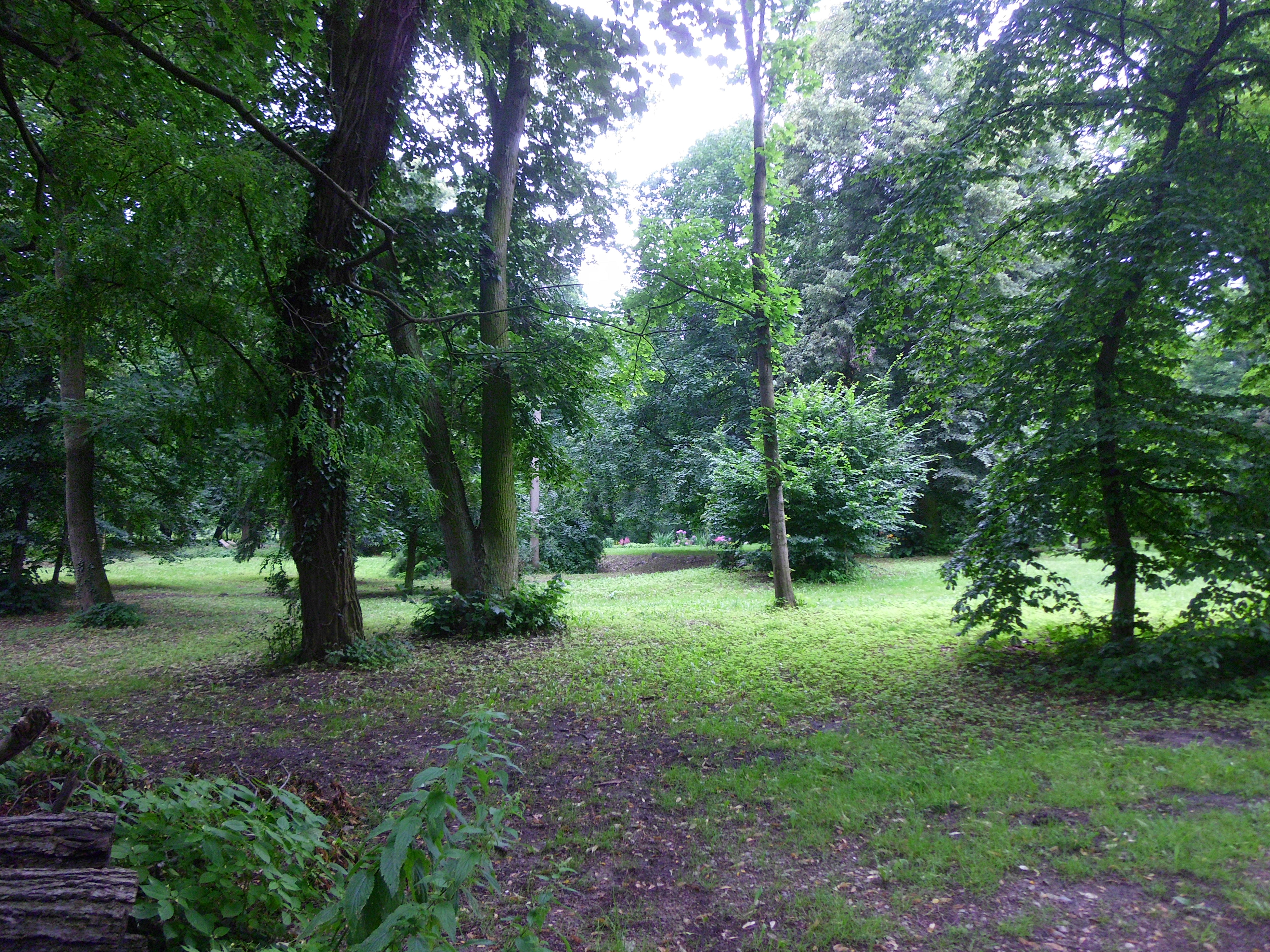 Ehemaliger Gutspark Jühnsdorf